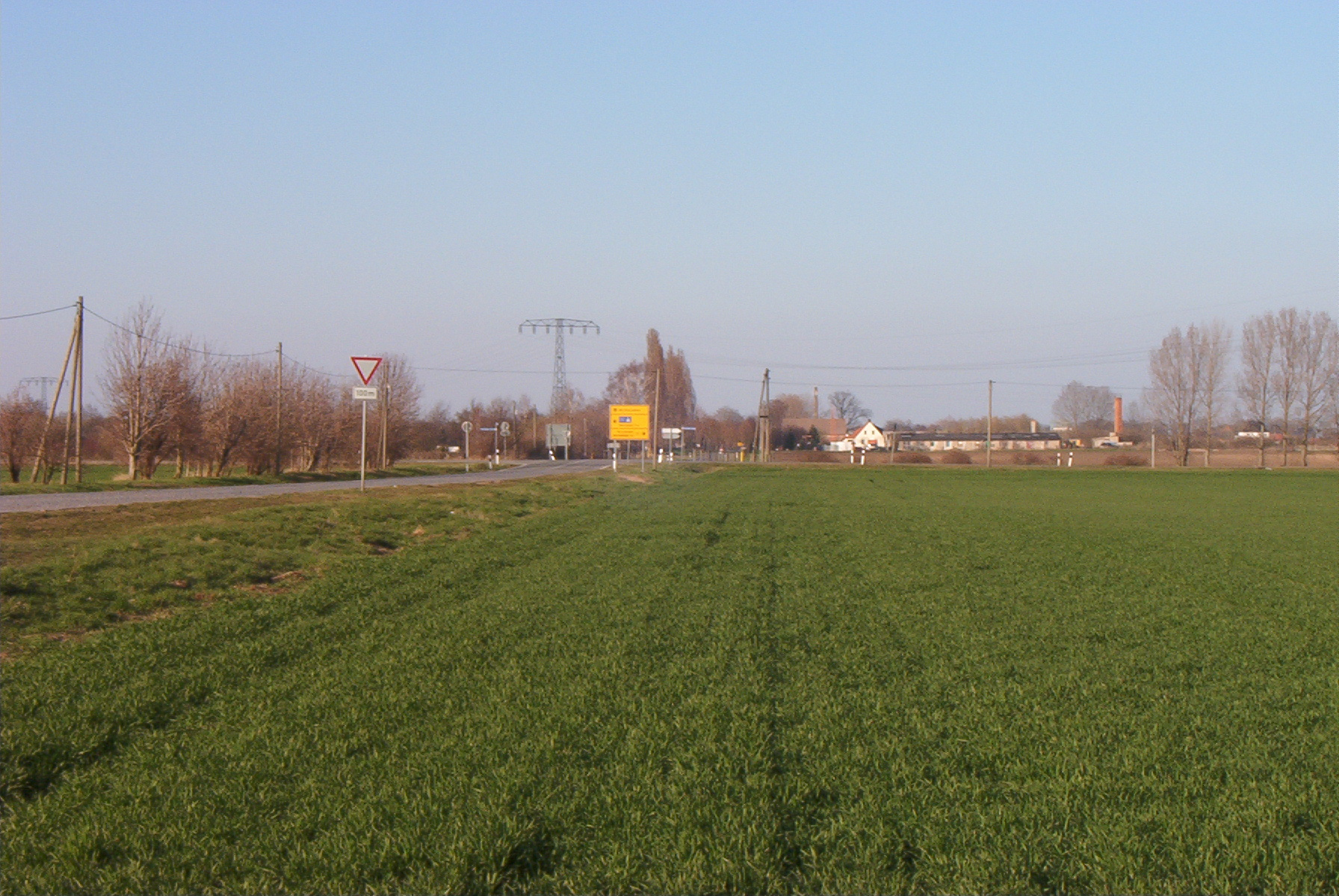 Lage der Wüstung Appendorf (West) bei Magdeburg